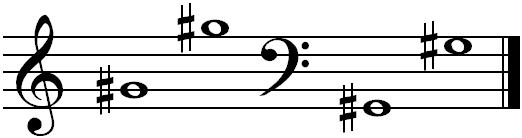 koobak